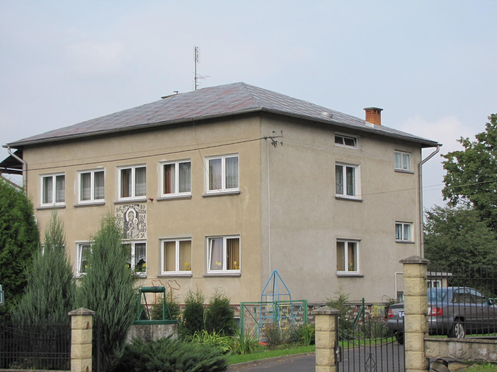 Dom zakonny i przedszkole.